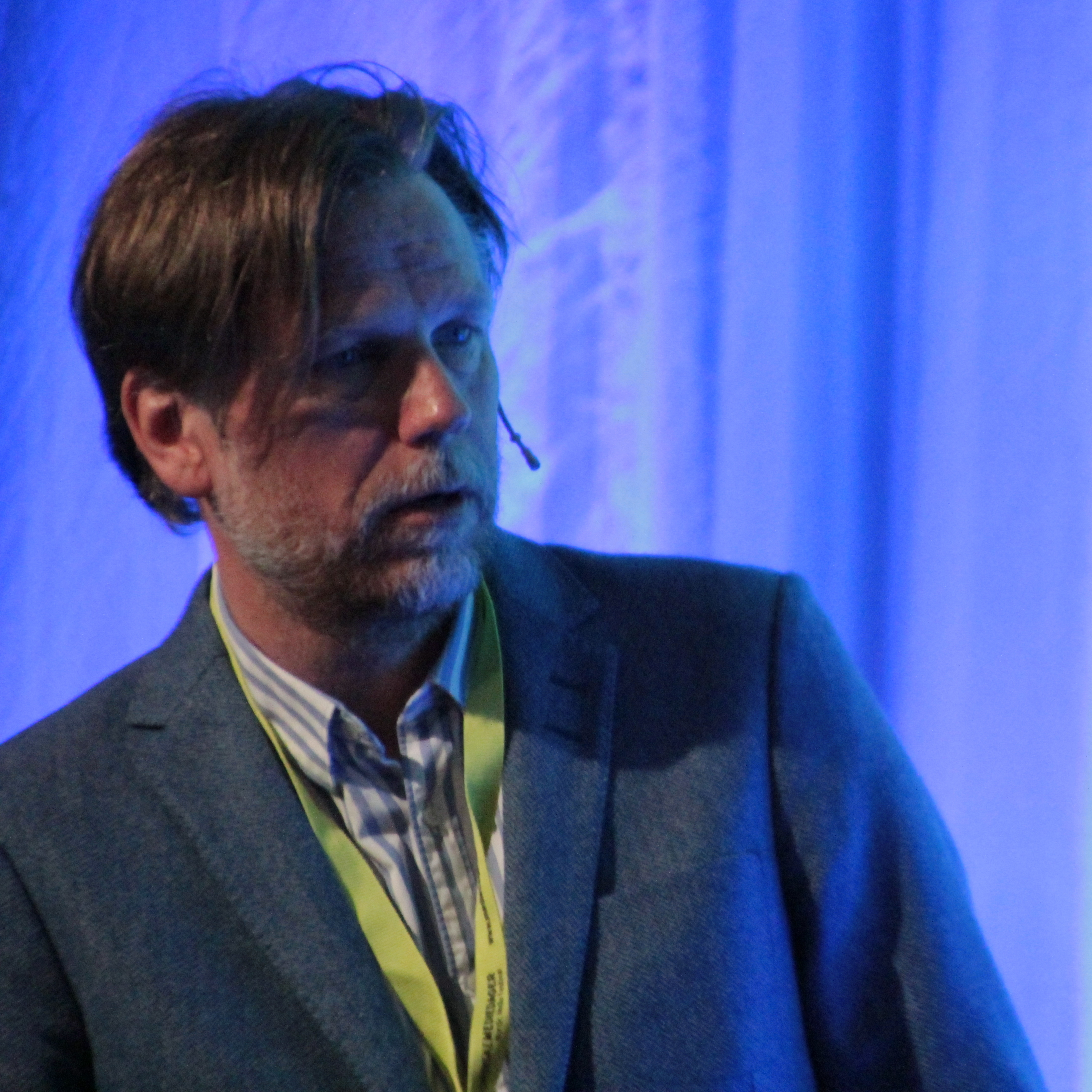 Medvirkende: Skjalg Fjellheim (Politisk redaktør, Nordlys) Irene Halvorsen (Sjefsredaktør, Nationen) Kyrre Nakkim (Samfunnsredaktør, NRK) Hans Petter Sjøli (Debattansvarlig og kommentator, VG) Moderator: Sarah Sørheim, Kulturredaktør Aftenposten